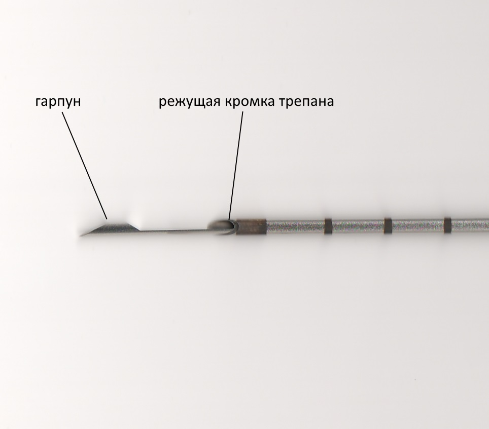 Игла для сердцевинной биопсии (кор-биопсии, core-биопсии, режущей биопсии).